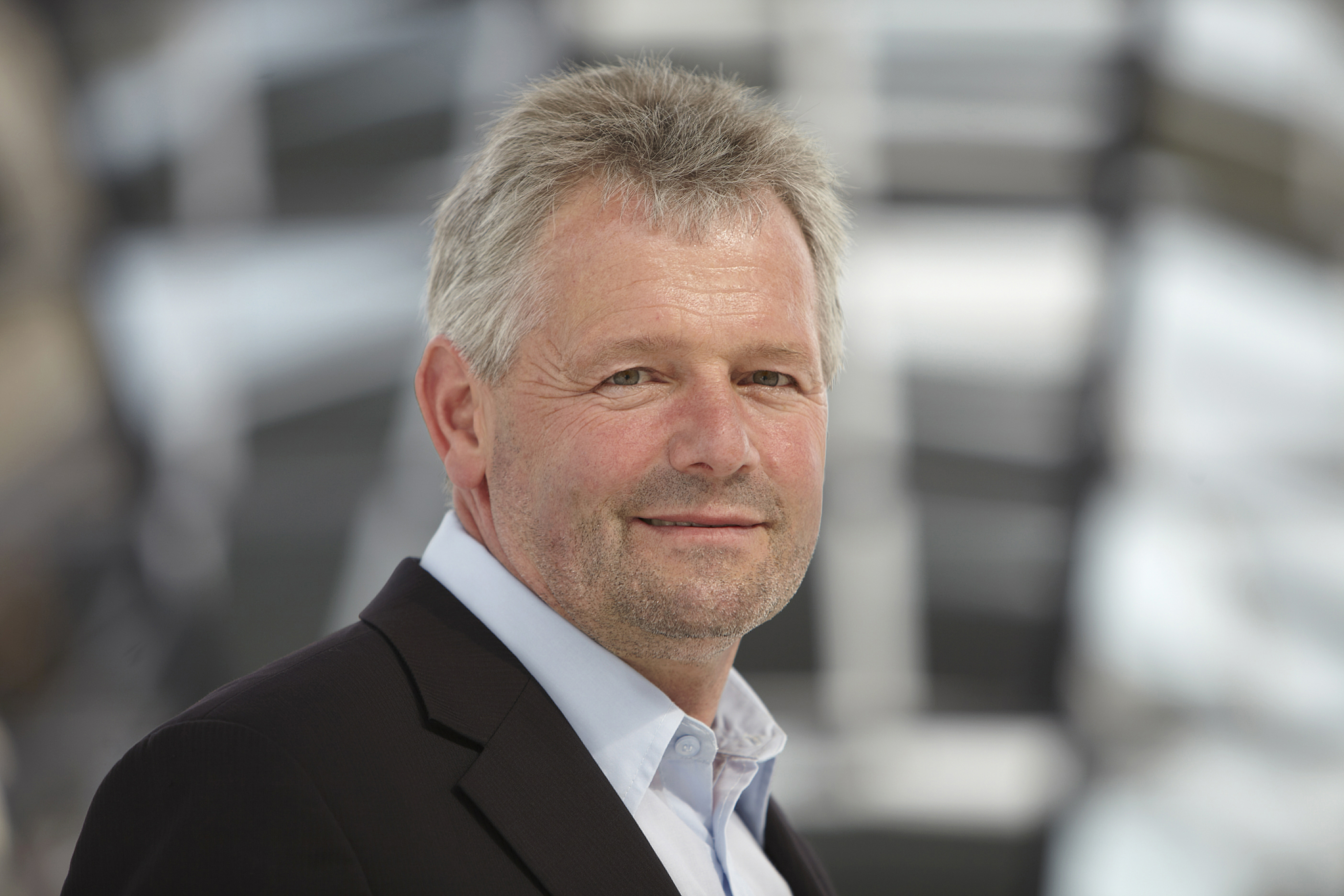 Alois Gering, MdB (2013)